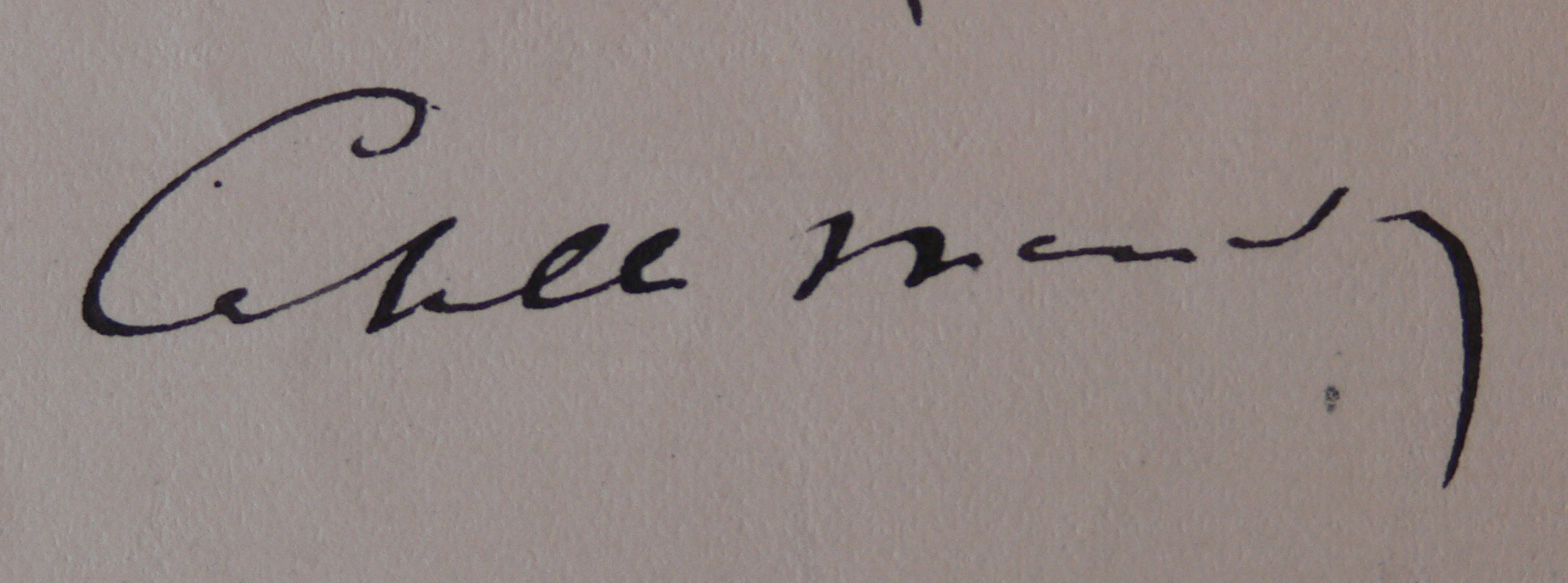 Sugnature de Catulle Mendès